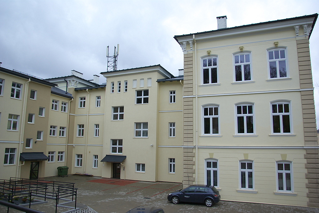 Dziedziniec II LO Sanok